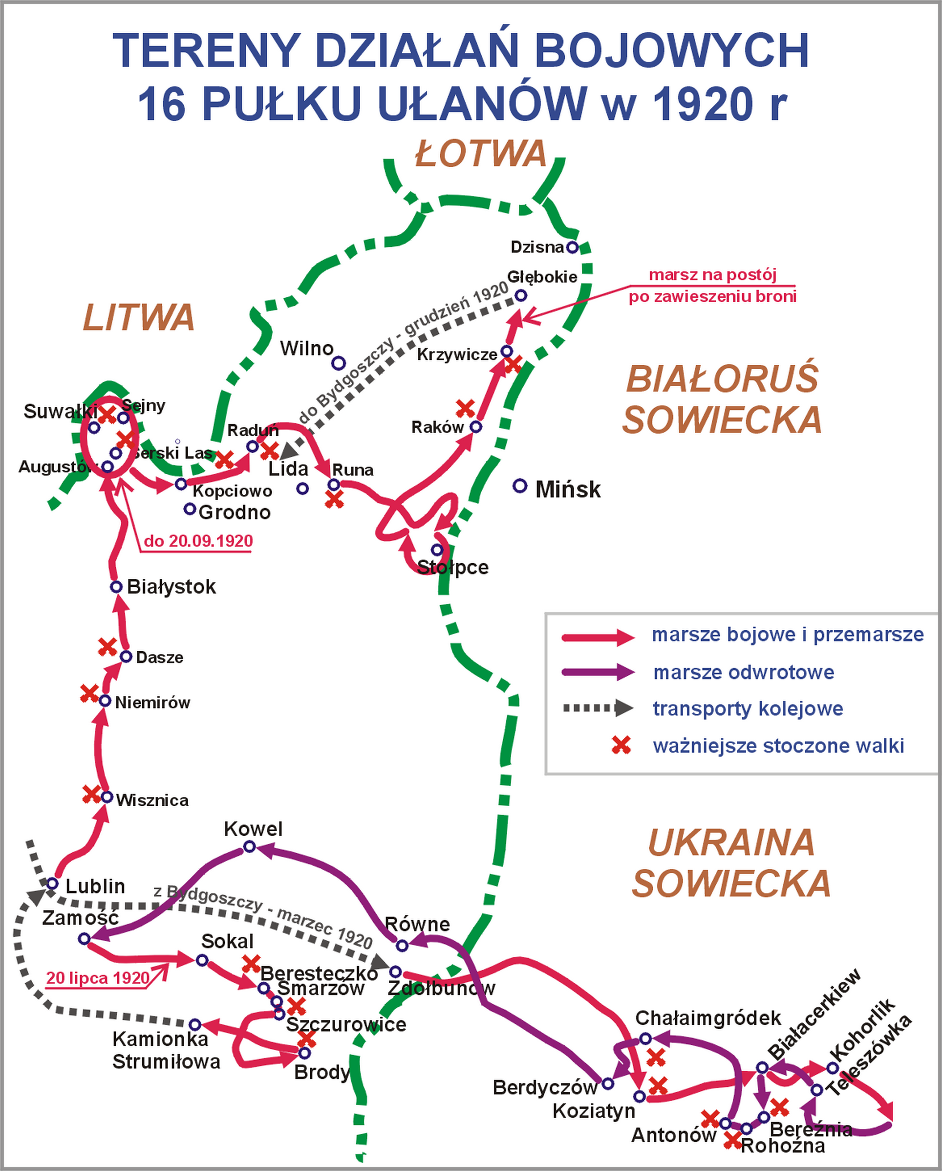 Tereny działań bojowych 16 Pułku Ułanów Wielkopolskich w 1920 r